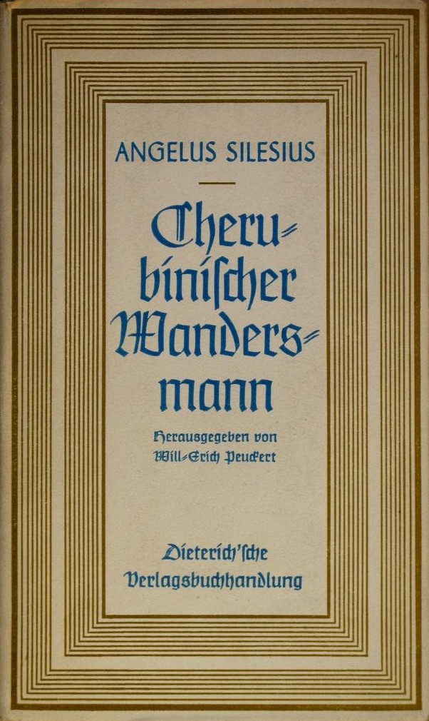 Angelus Silesius: Cherubinischer Wandersmann. Eingeleitet und erläutert von Will-Erich Peuckert, Leipzig, Dieterich, o. J. (ca. 1939). Sammlung Dieterich 64